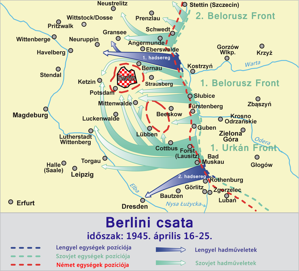 Berlini csata - 1945. április 16-25.